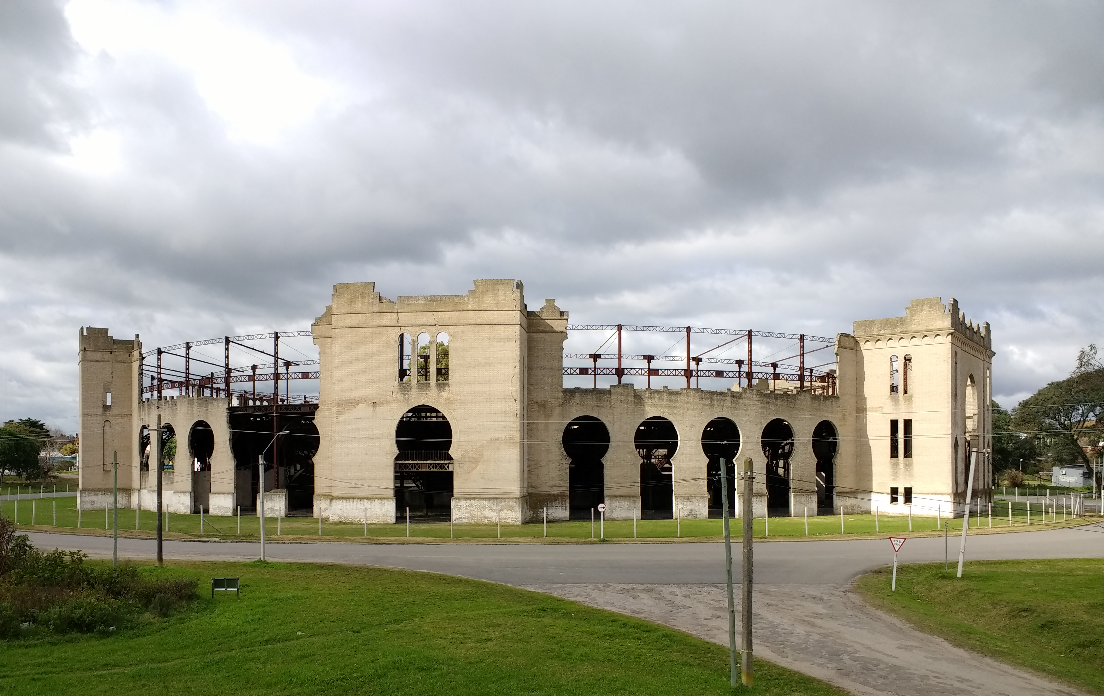 Plaza de toros de Colonia del Sacramento.